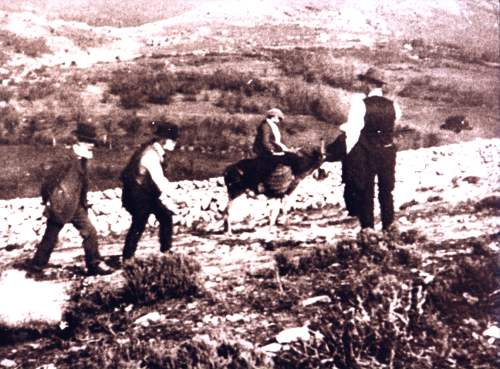 Rafael Altamira y Giner de los Ríos subiendo de Cercedilla al Ventorrillo (Madrid)